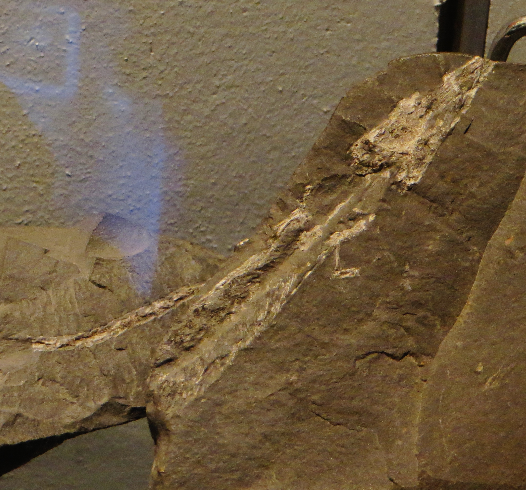 Fossil - Took the picture at Museum of Natural History, Autun